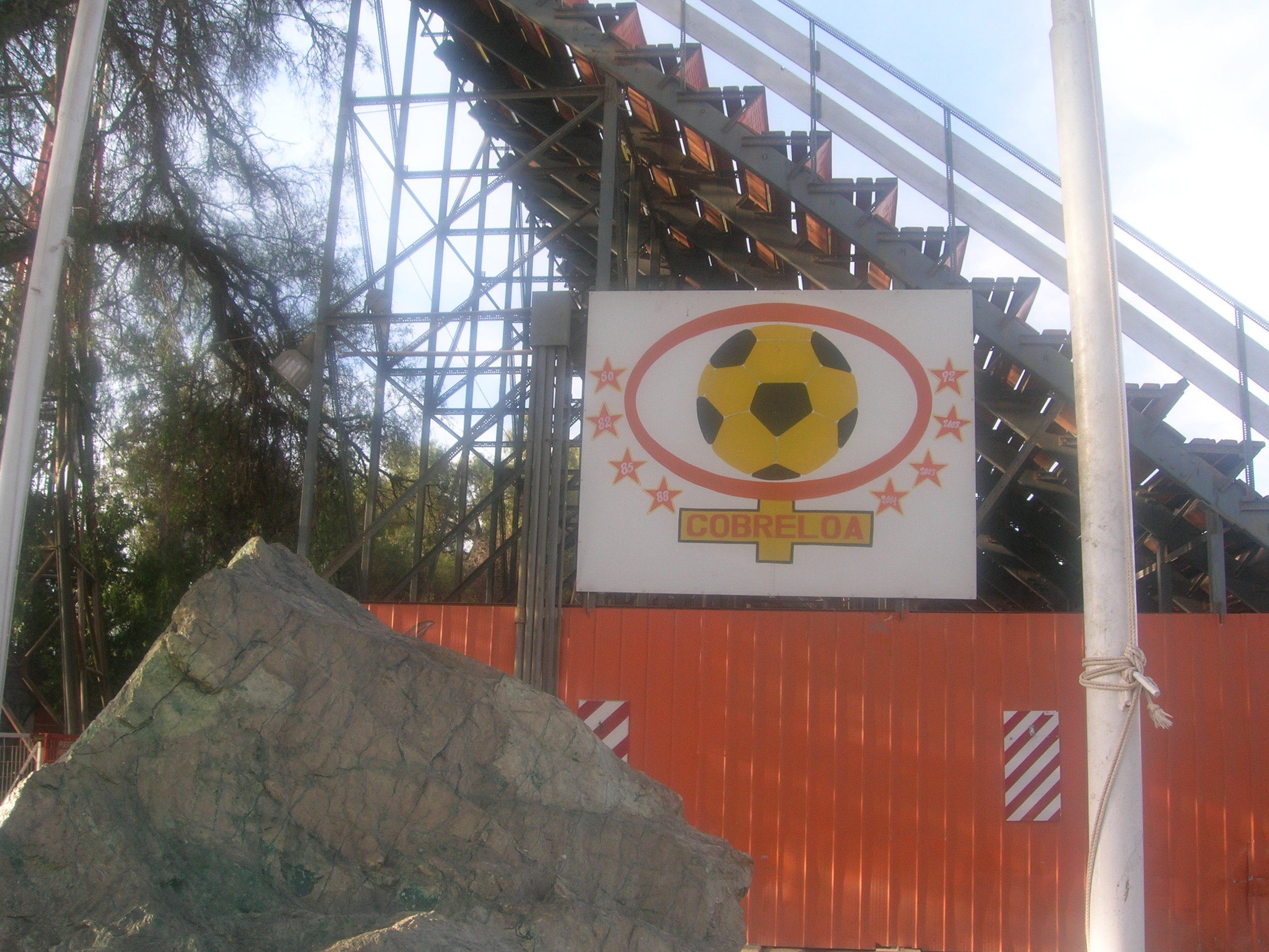 Ilustración del escudo de Cobreloa